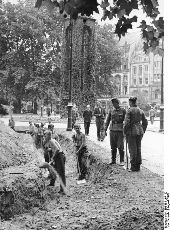 Berlin, Dönhoffplatz, Bau von Splittergräben In der Reichshauptstadt sind jetzt Soldaten eingesetzt, die auf den öffentlichen Plätzen in sachgemäßer Weise Splittergräben für den Schutz der Bevölkerung gegen den Luftterror anlegen [am Dönhoffplatz] Scherl Bilderdienst (Schwahn) 12.8.1943